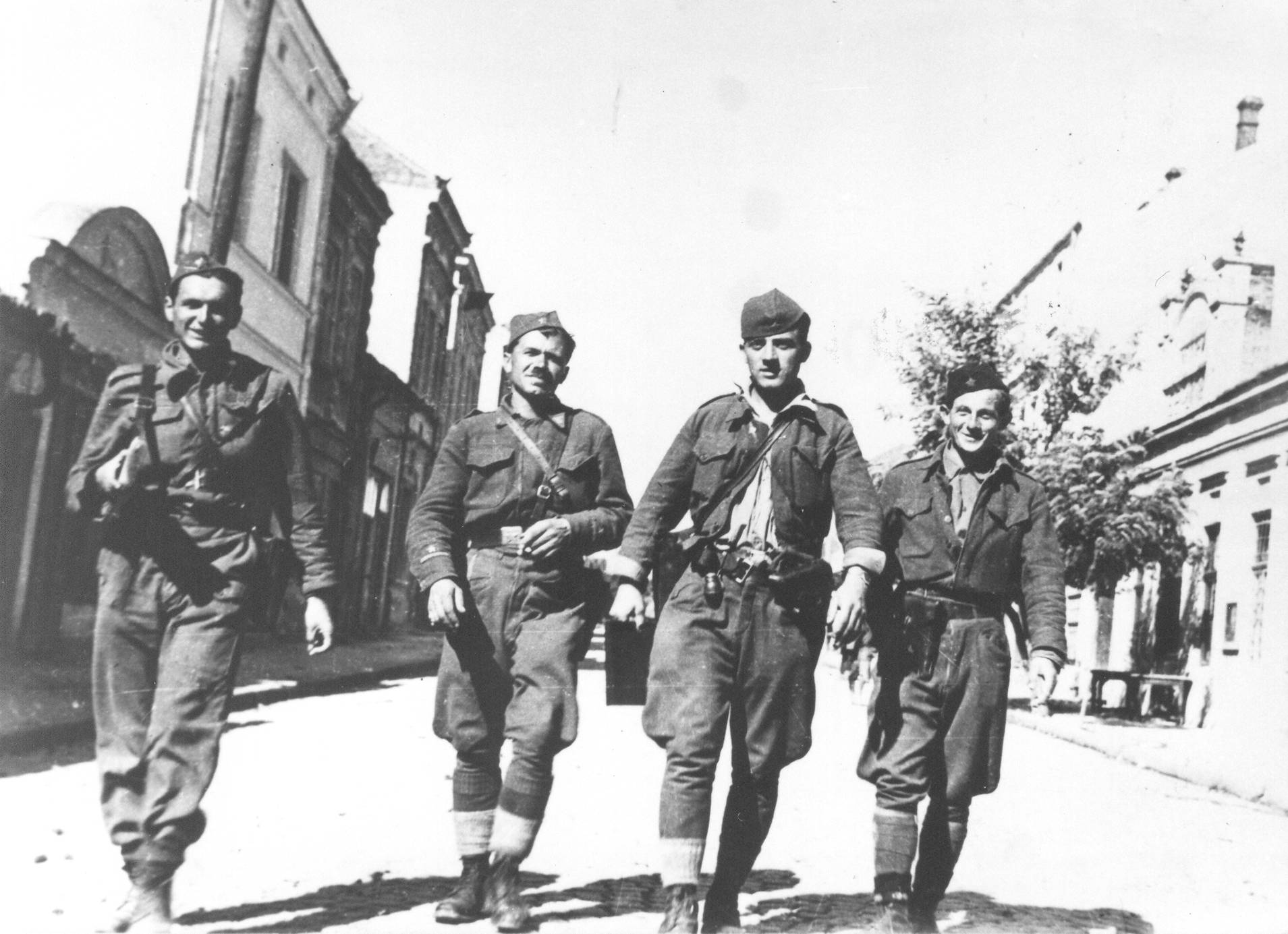 Srpskohrvatski / српскохрватски: Borci Prve krajiške u oslobođenom Aranđelovcu, septembar 1944. S leva: Milenko Kovačević, Dušan Vujnović, Slobodan Špegar i Jovo Ćurčić.